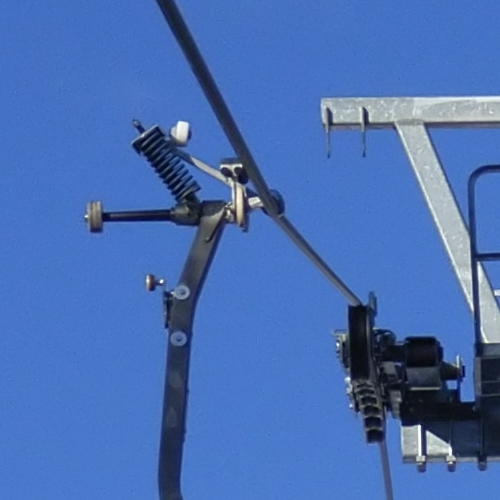 Aufhängung einer auskuppelbaren Sesselbahn („Marchner“ (6-KSB/B) am Kronplatz in Italien, Südtirol).